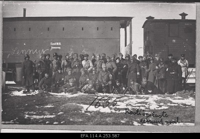 Vabadussõda. Laiarööpmelise soomusrongi nr. 5 dessantosa - miiniristlejalt "Lennuk" saabunud meredessantpataljoni 2.rood - Orava lähedal. Paremal seisab (binokliga rinnal) merejõudude juhataja mereväekapten Johan Pitka (märts 1919).